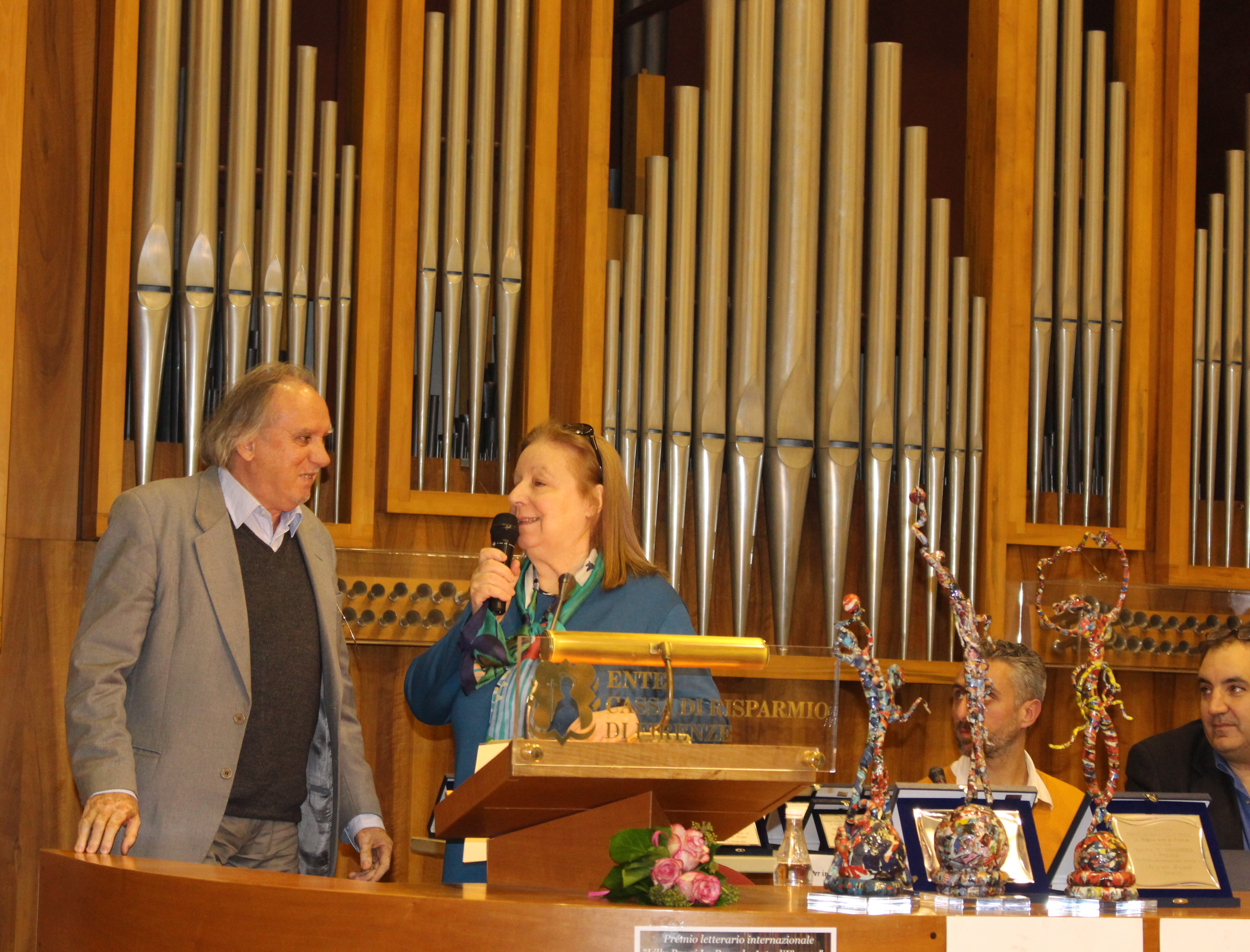 Premiazione del Concorso "Lilly Brogi La Pergola Arte" di Firenze VII Edizione 2015